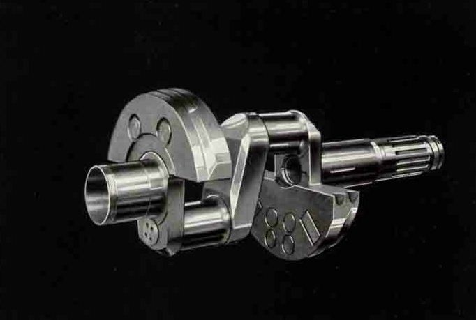 Vilebrequin 14AB avec amortisseur Sarazin